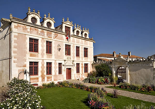 Mairie de Soubise - Charente-Maritime Photo issue de ma banque d'images : Pep.per 13 octobre 2006 à 22:15 (CEST)